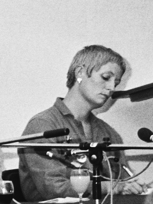 Mieke Bal. Forum in Artis & Amicitiae. Datum 25 juni 1980